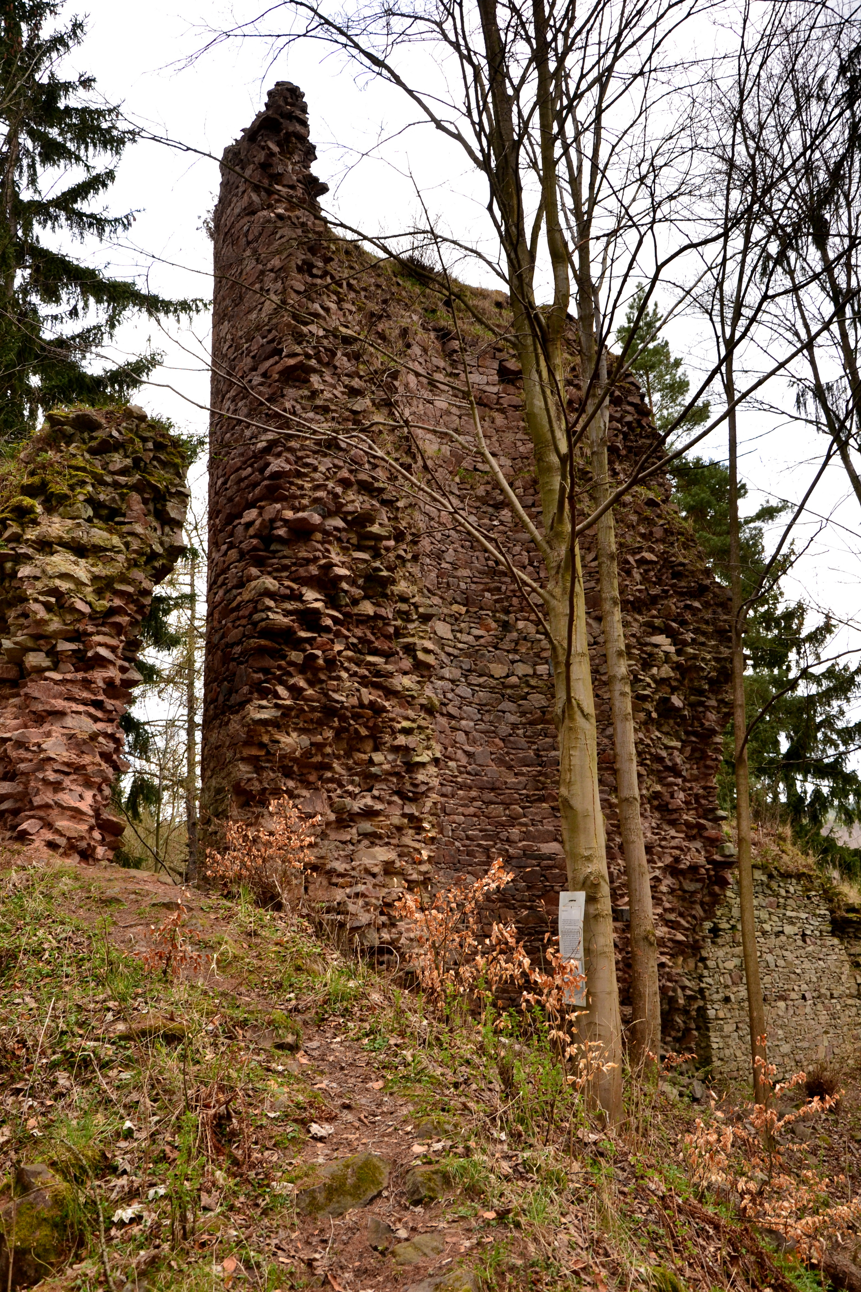 Bergfrit